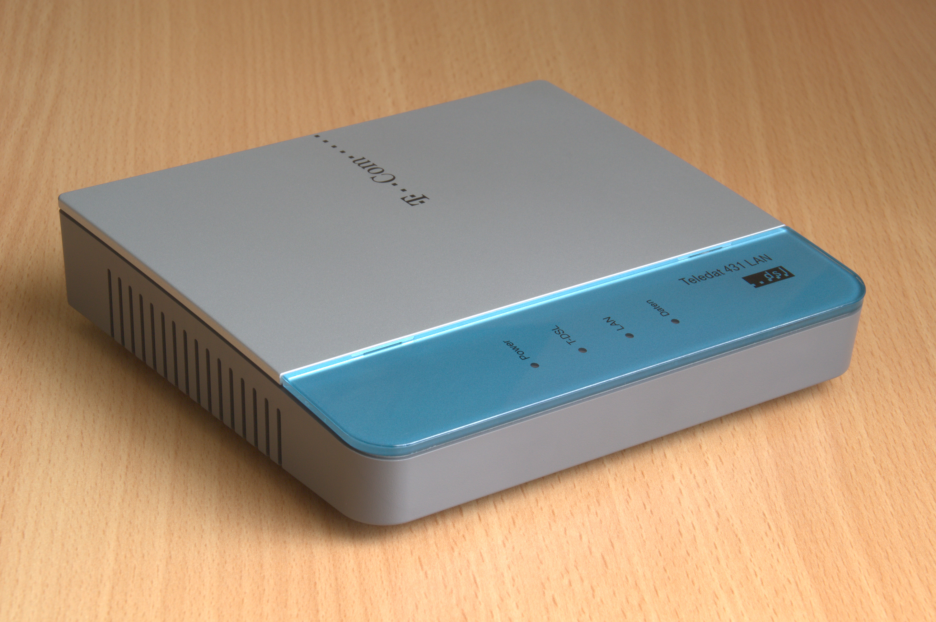 DSL-Modem Teledat 431 LAN der Deutschen Telekom, Frontansicht